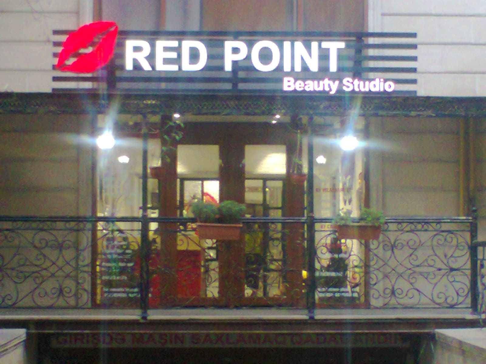 Cалон красоты «Red Point» в Баку